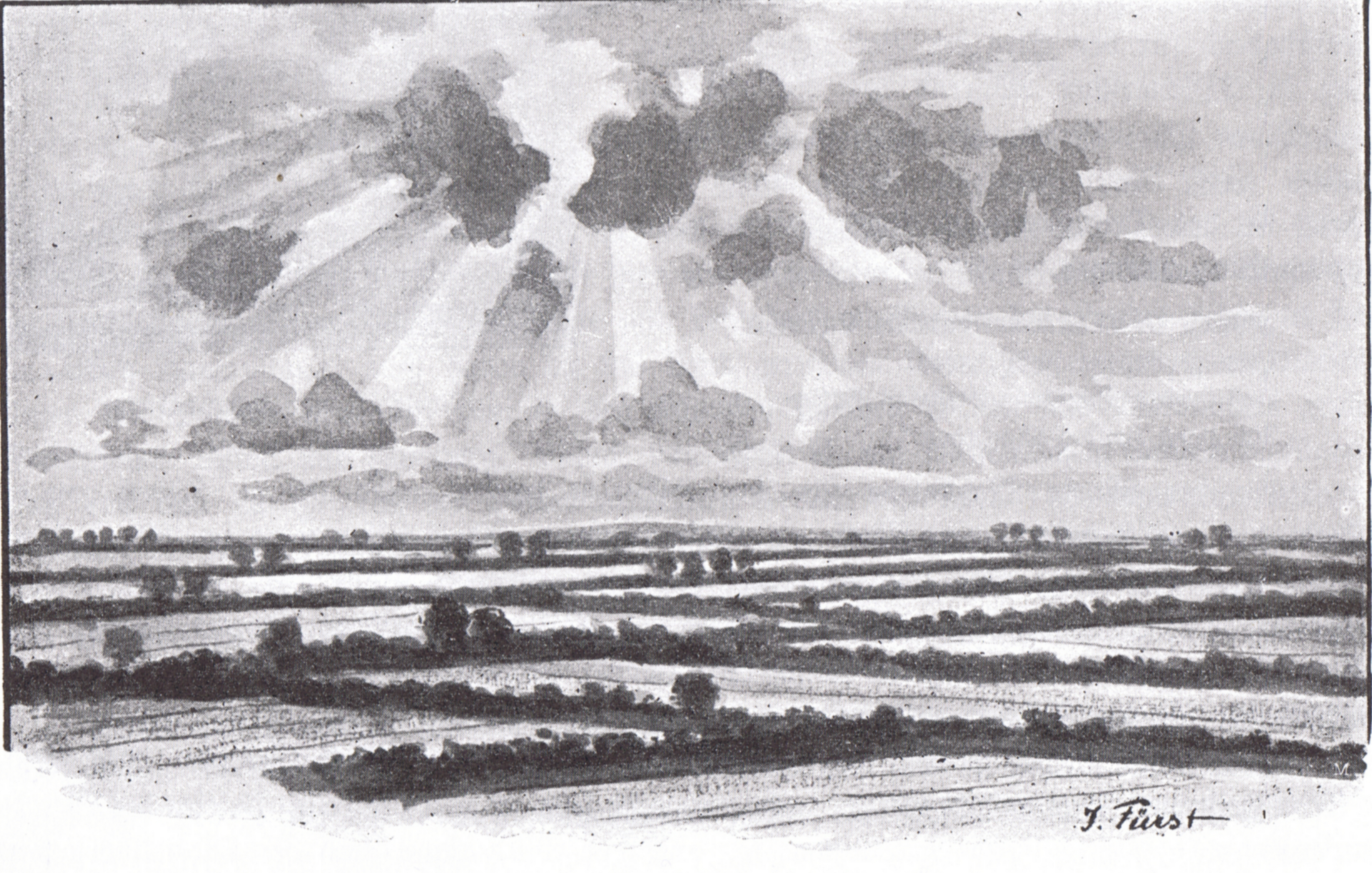 Bild vom Schlachtfeld von Bornhöved (1227).